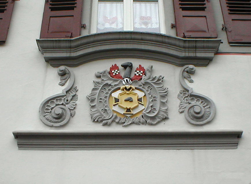 Wappen von Deutschordens-Komtur von Buseck an der ehemaligen Bannwirtschaft des Deutschen Ordens in Gundelsheim am Neckar.